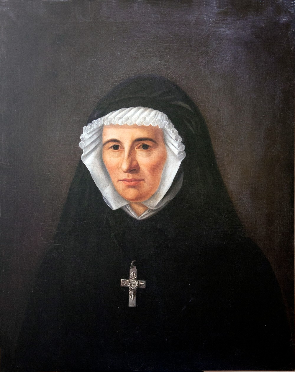 portrait de sainte Claudine Thévenet